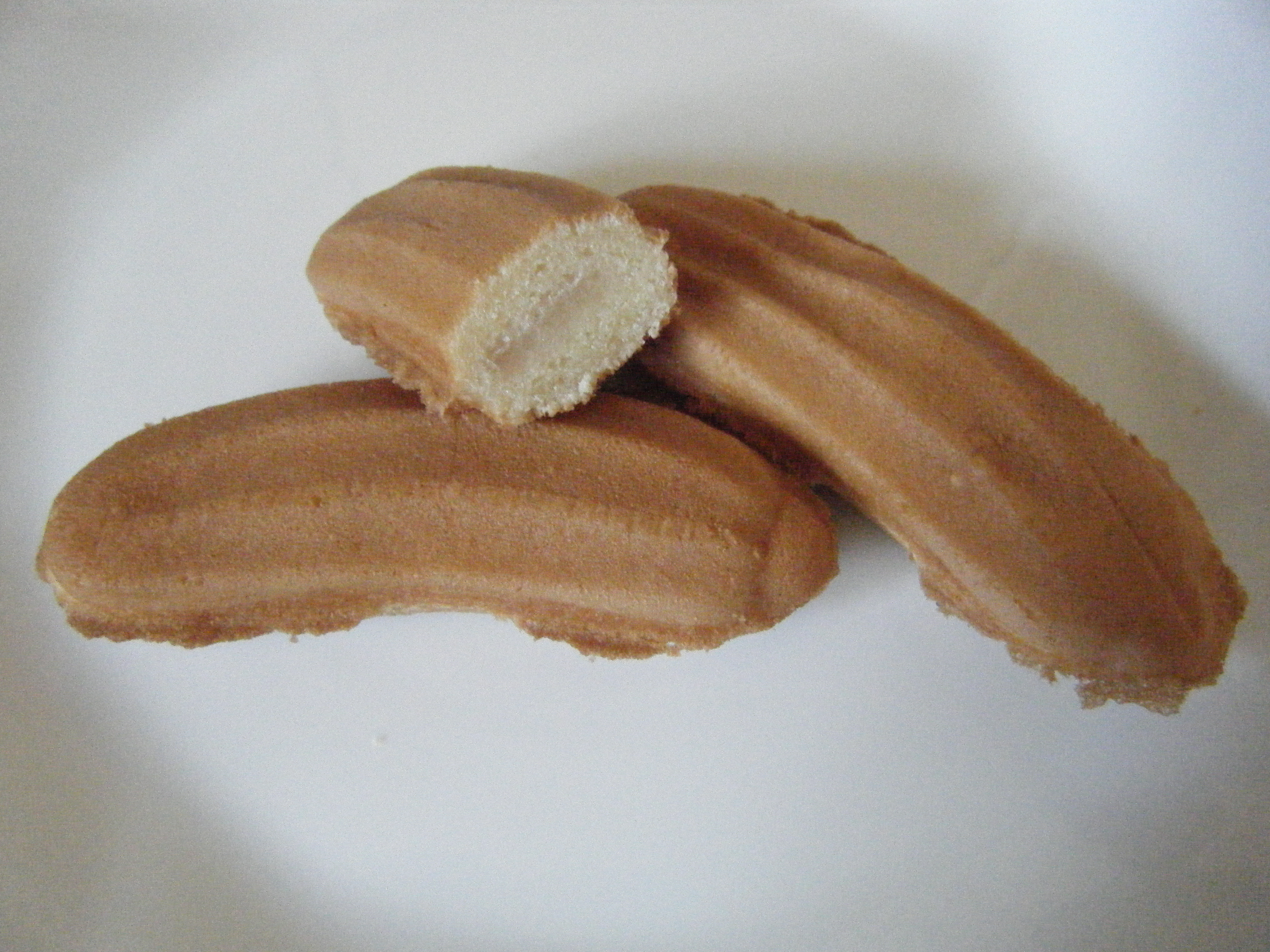 バナナ饅頭（北海道、池田町の銘菓）